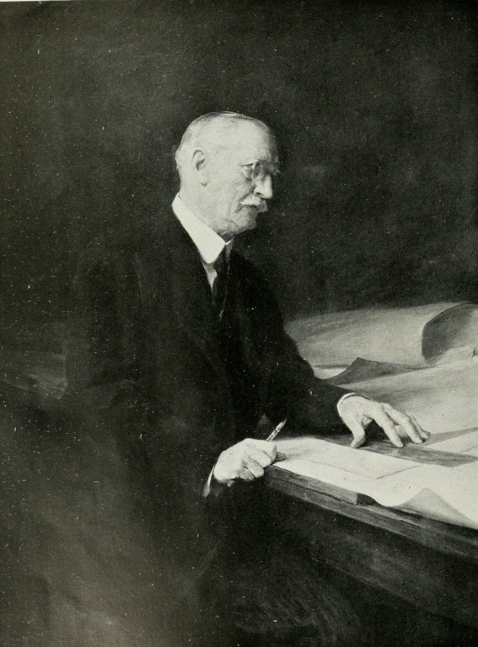 Sir John William Simpson KBE FRIBA (9 August 1858 – 30 March 1933)